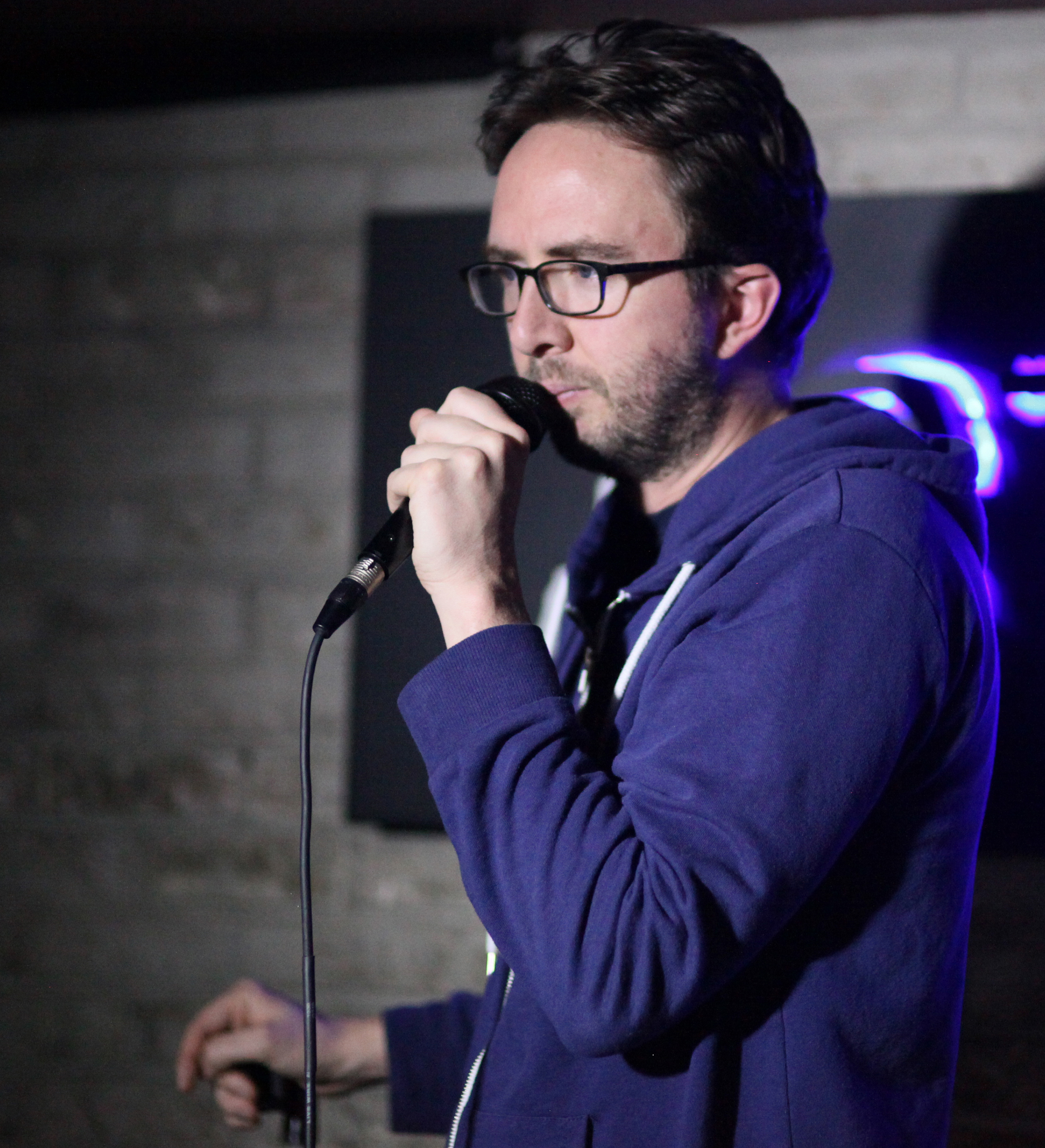 List in December 2016.